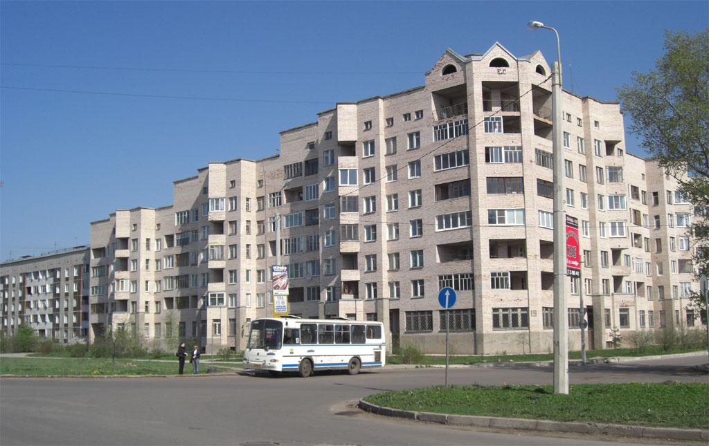 Гатчина, микрорайон Рощинский